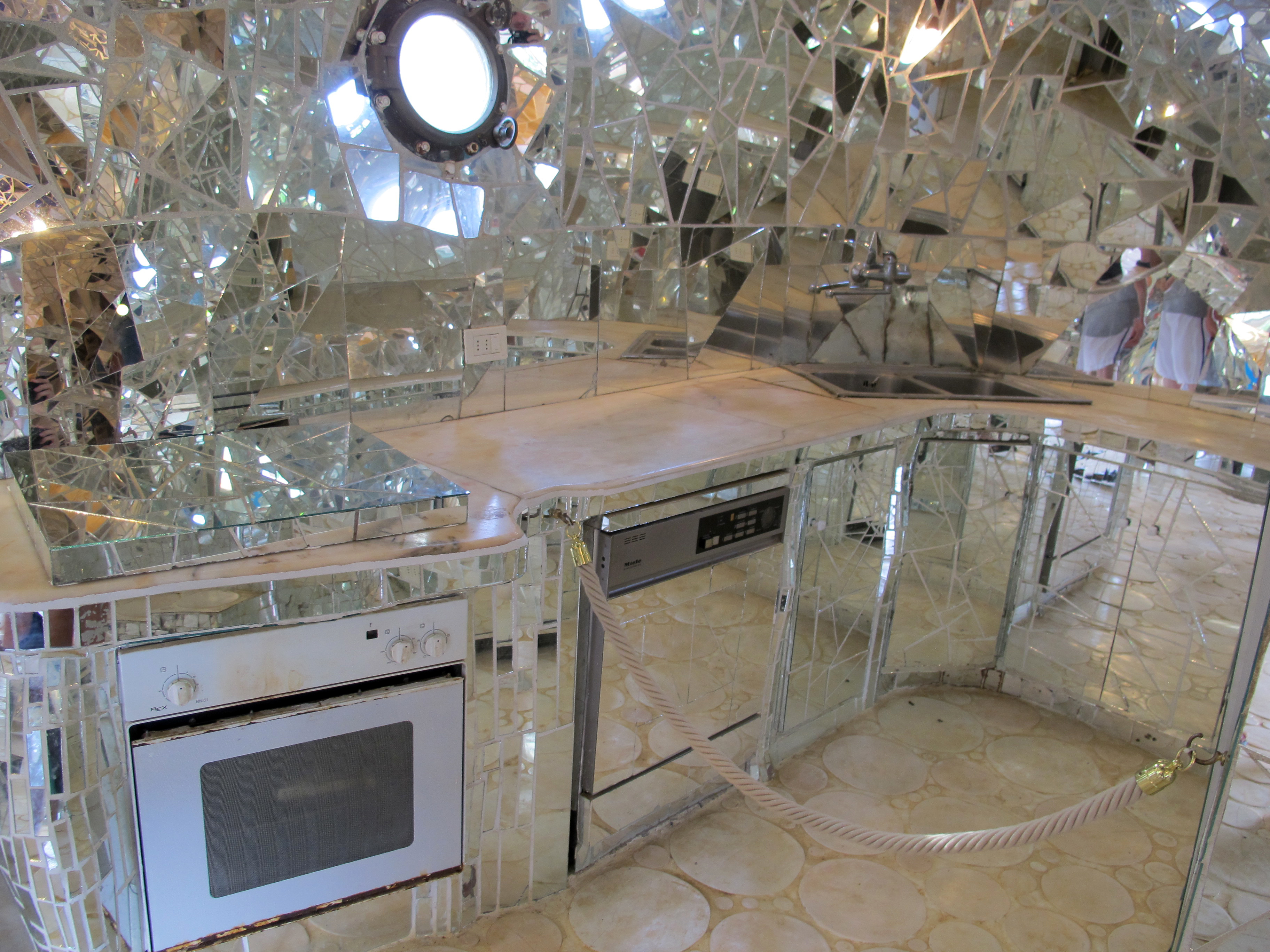 Giardino dei Tarocchi, Capalbio